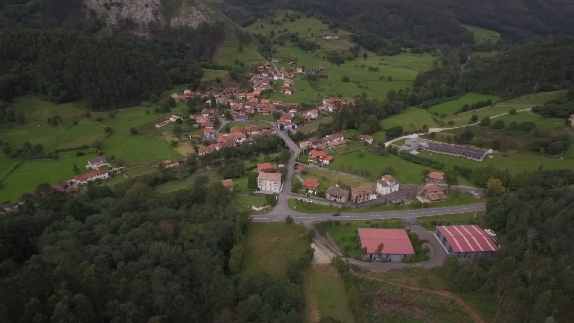 En esta fotografía pueden observarse los distintos núcleos poblacionales de Rales.